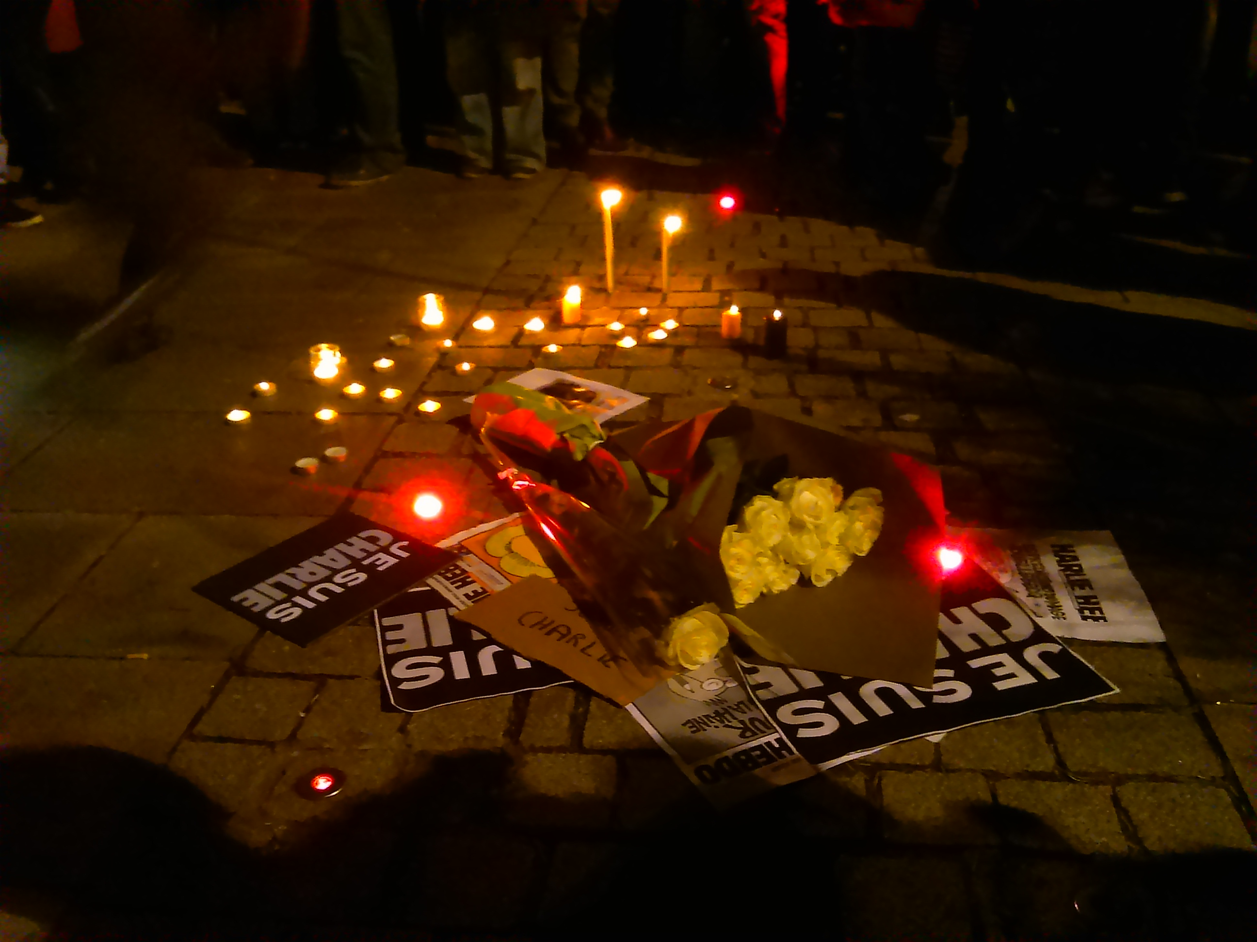 Dépôts de fleurs et de bougies en hommage aux victimes de l'attaque contre Charlie Hebdo, mardi 7 janvier 2015 à 18h40 place Aristide Briand à Lorient.